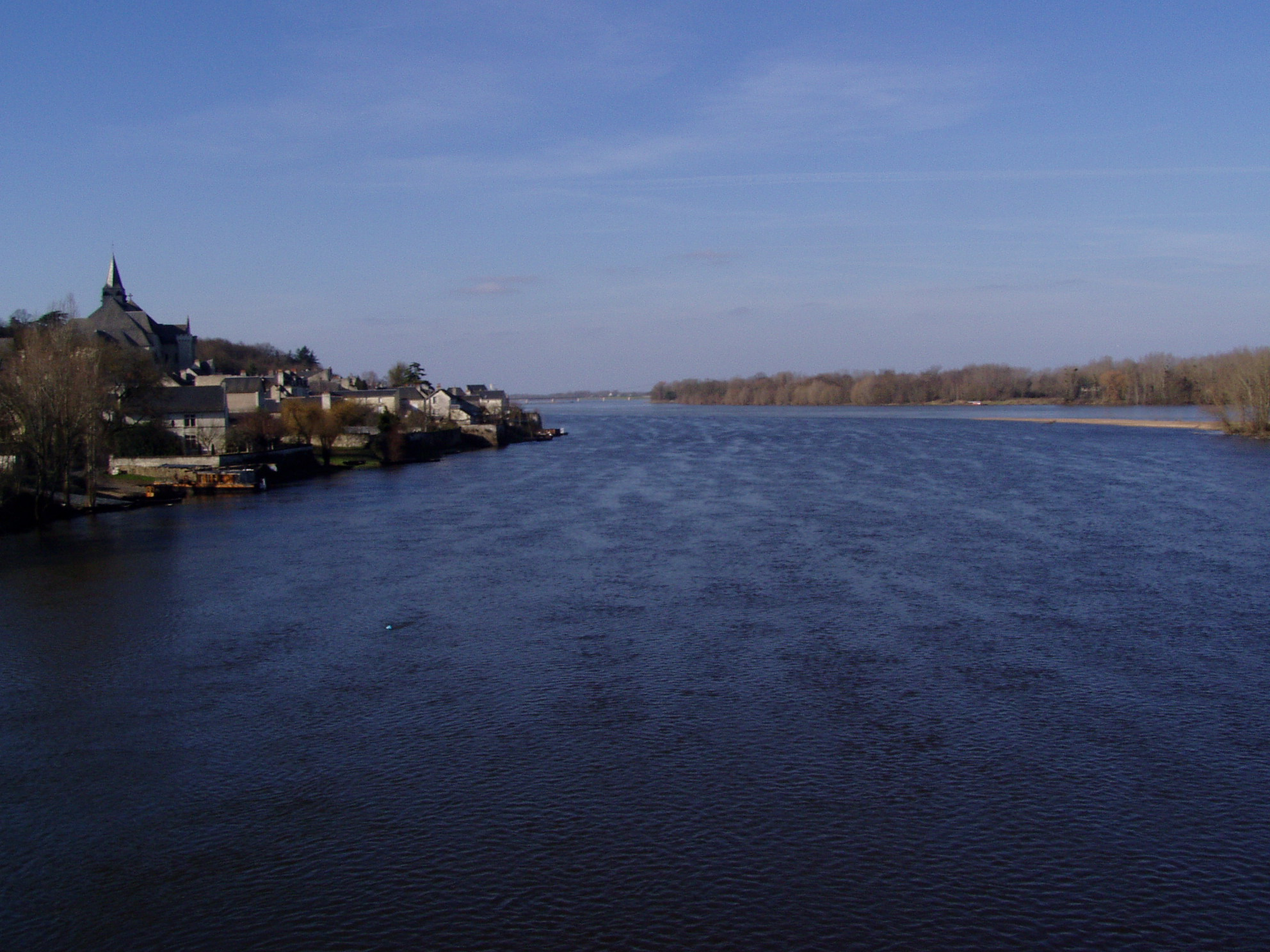 Confluent de la Vienne et de la Loire a Candes-Saint-Martin